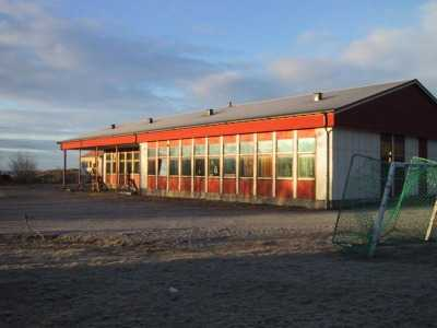 From Osen, Sør-Trøndelag, Norway. Sæter school